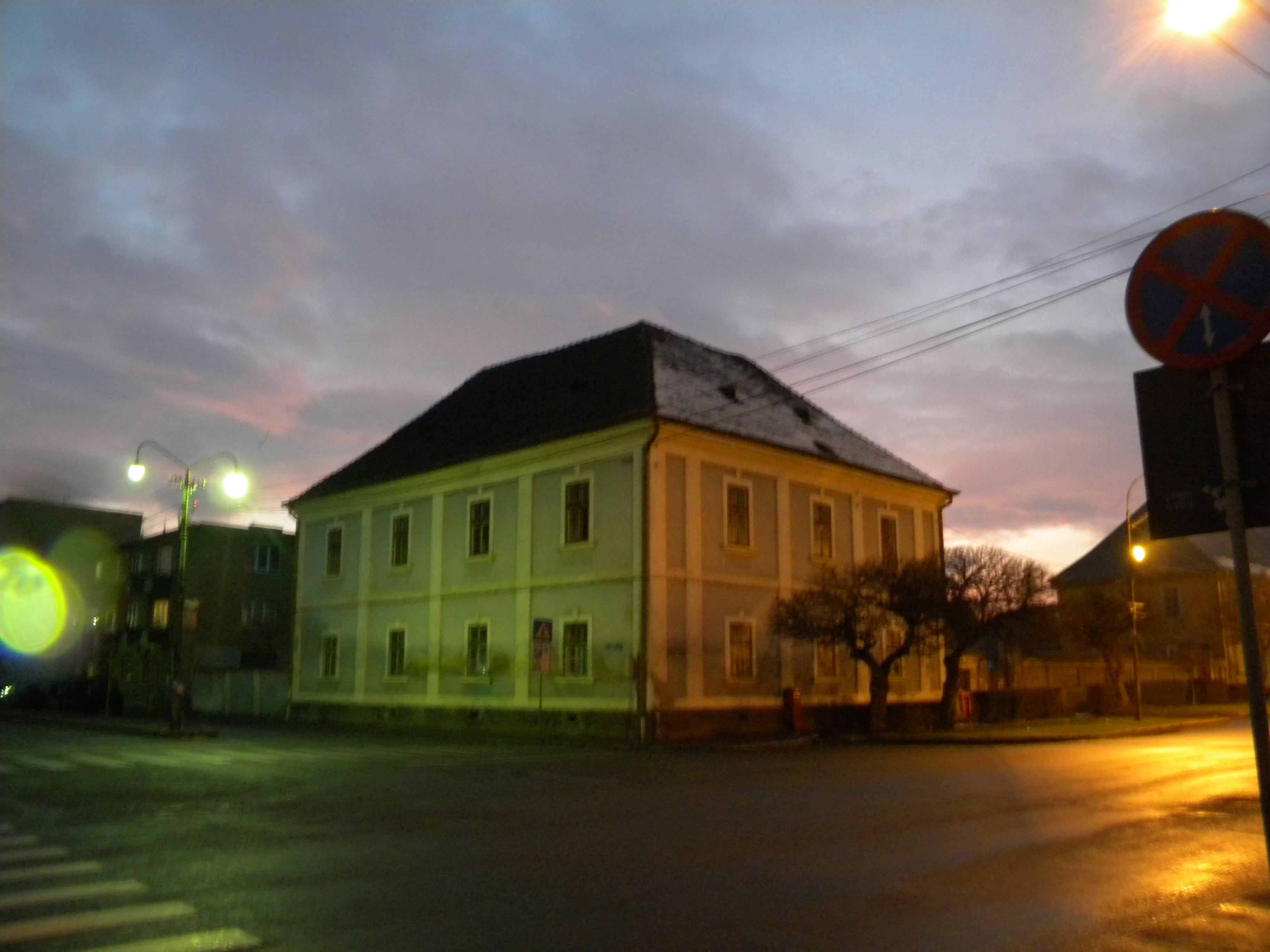 Kanonokpalota